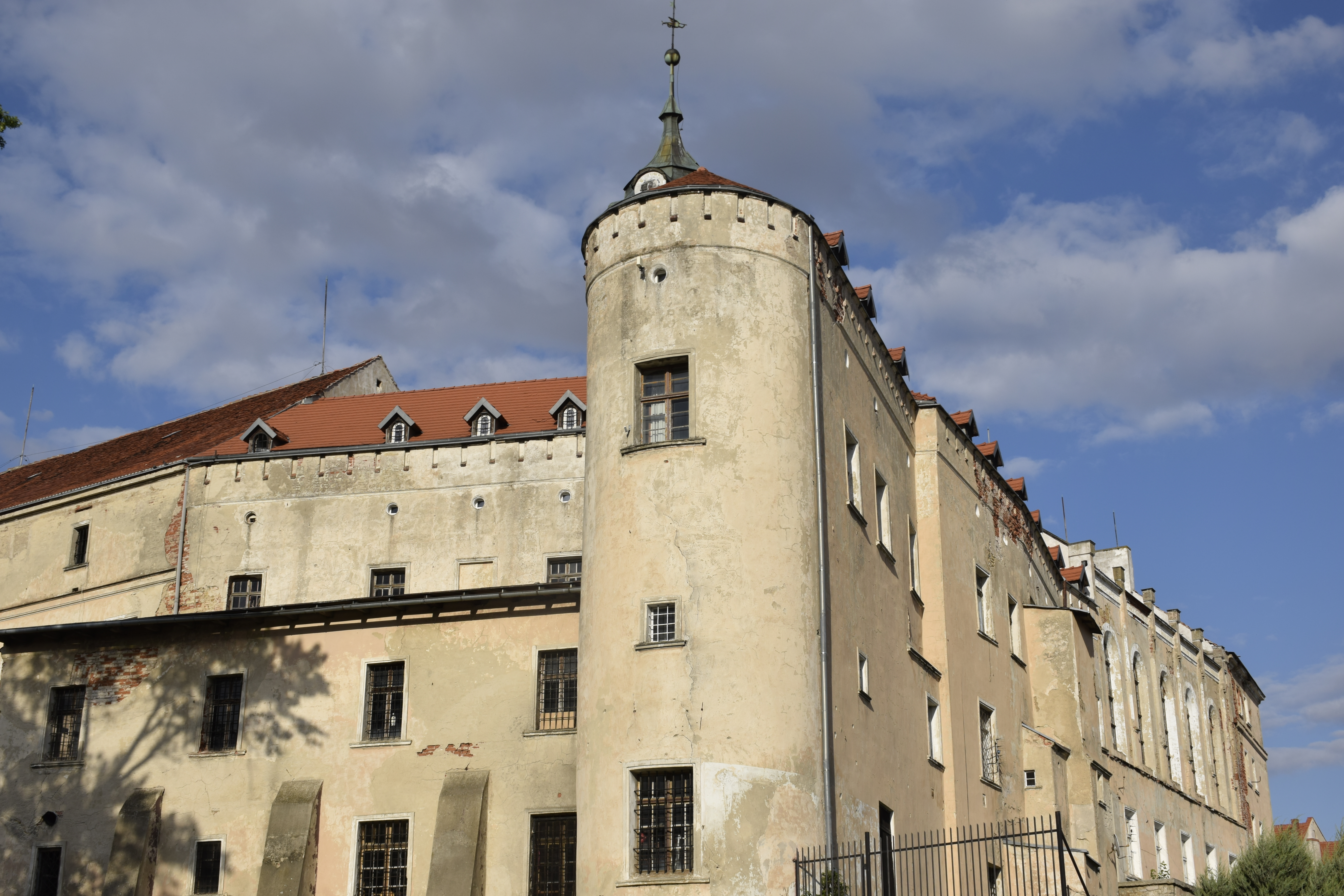 Jawor. Polska.